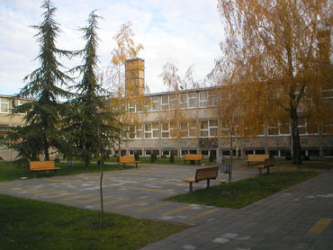 Izgled dvorišta nakon adaptacije